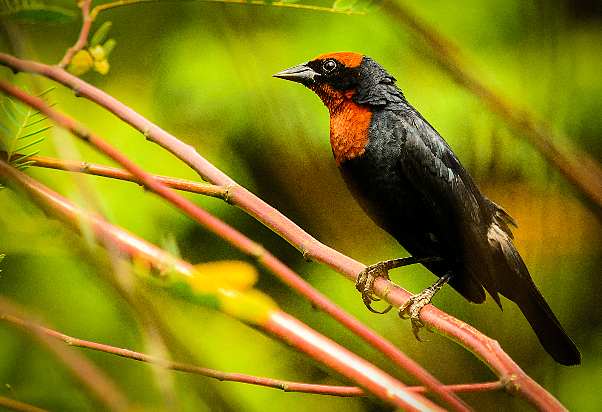 Garibaldi Chrysomus ruficapillus em Parque Botânico Eloy Chaves.